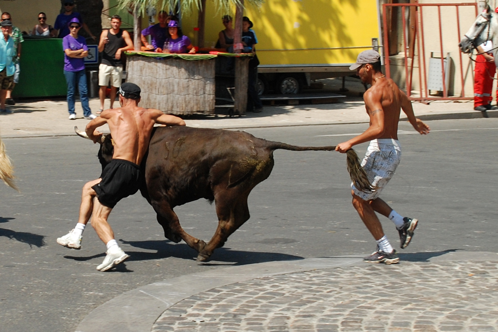 France - Gard - Calvisson - Abrivado-bandido - atrapaïre